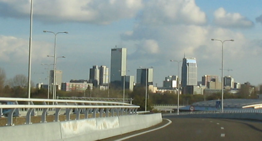 Skyline Rotterdam, 13 november 2005